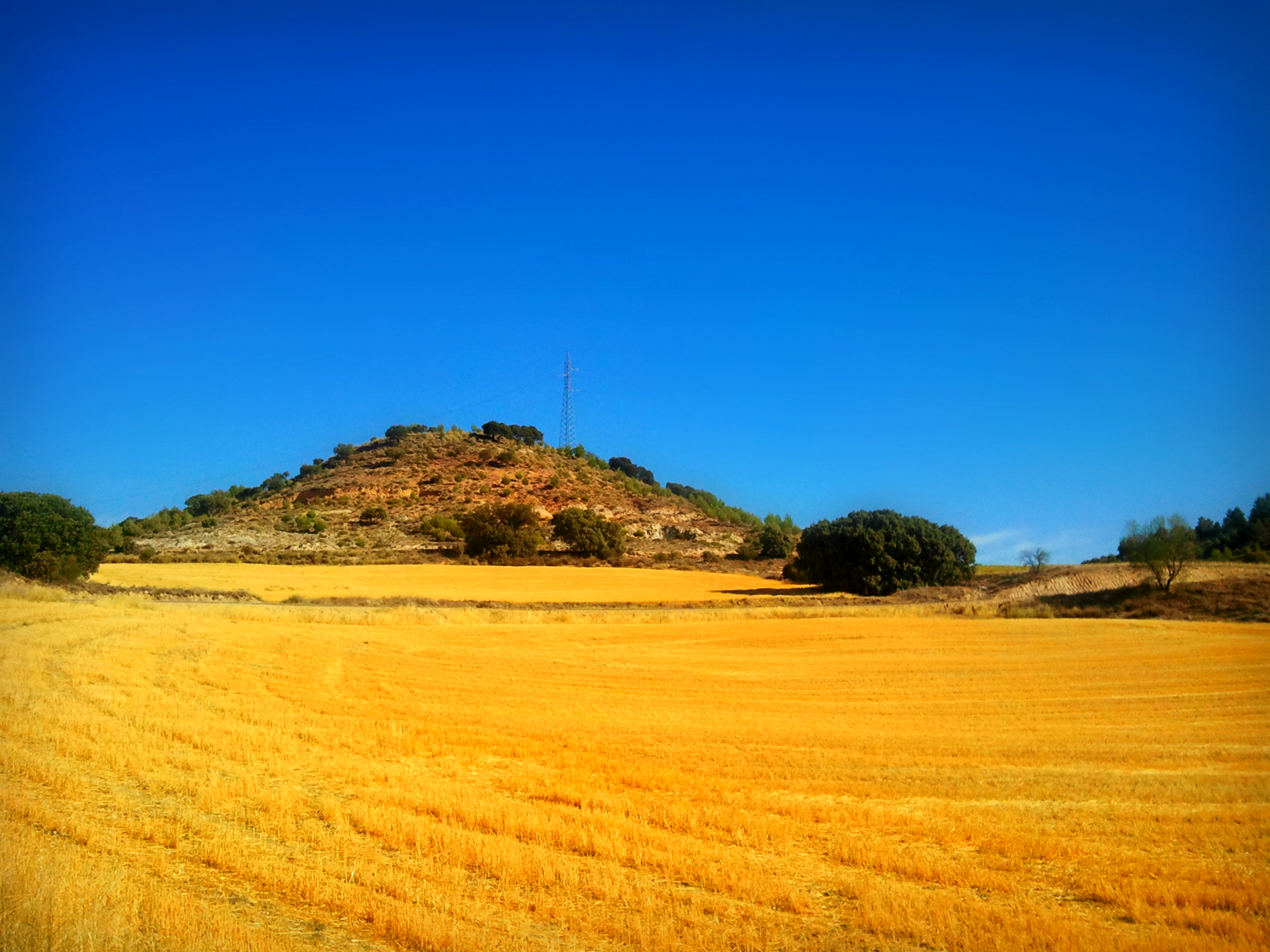 Trigo ya cosechado, Cuenca